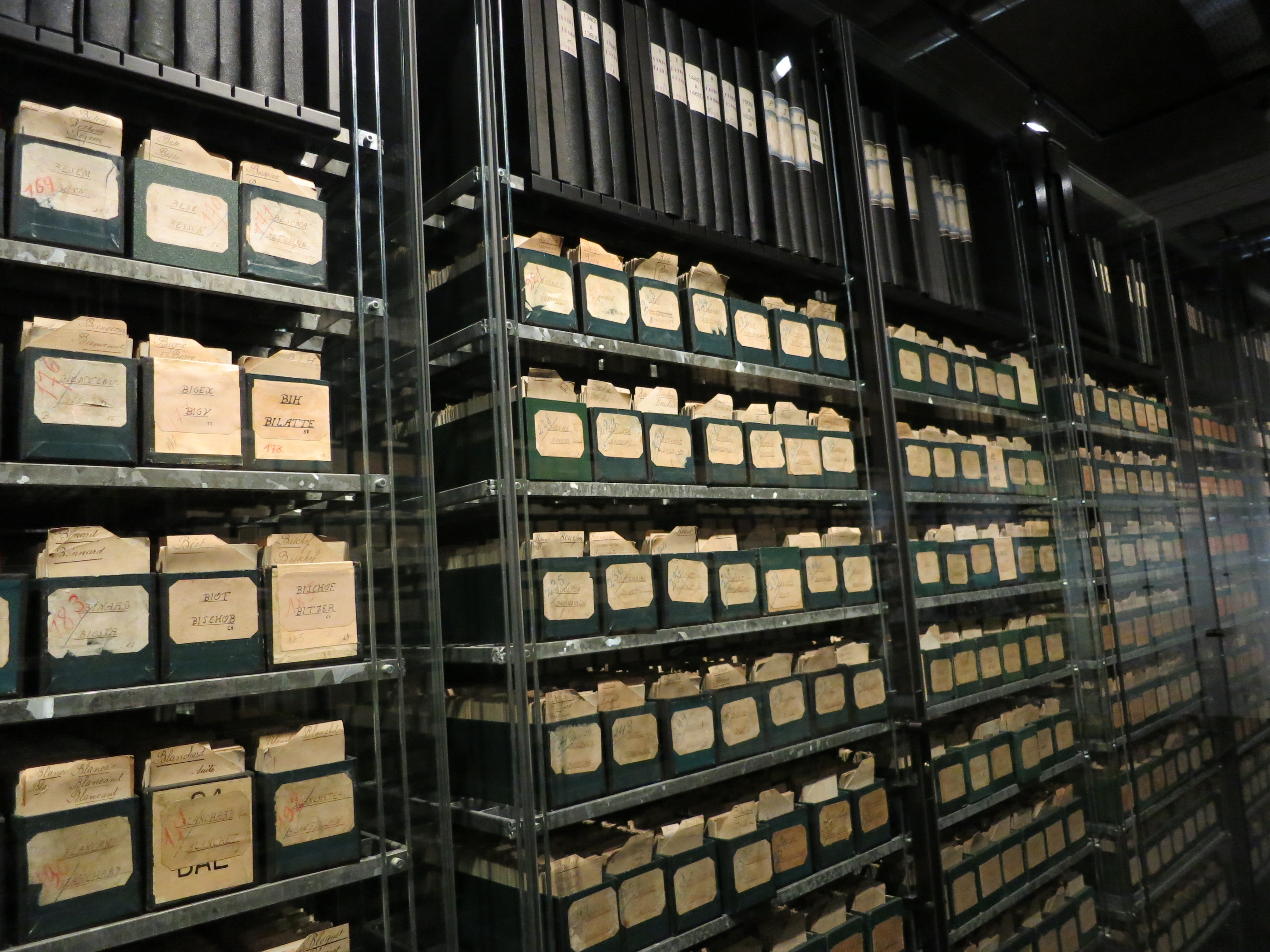 Kriegsgefangenenkartei 1914-1923, IKRK Museum, Genf, Schweiz